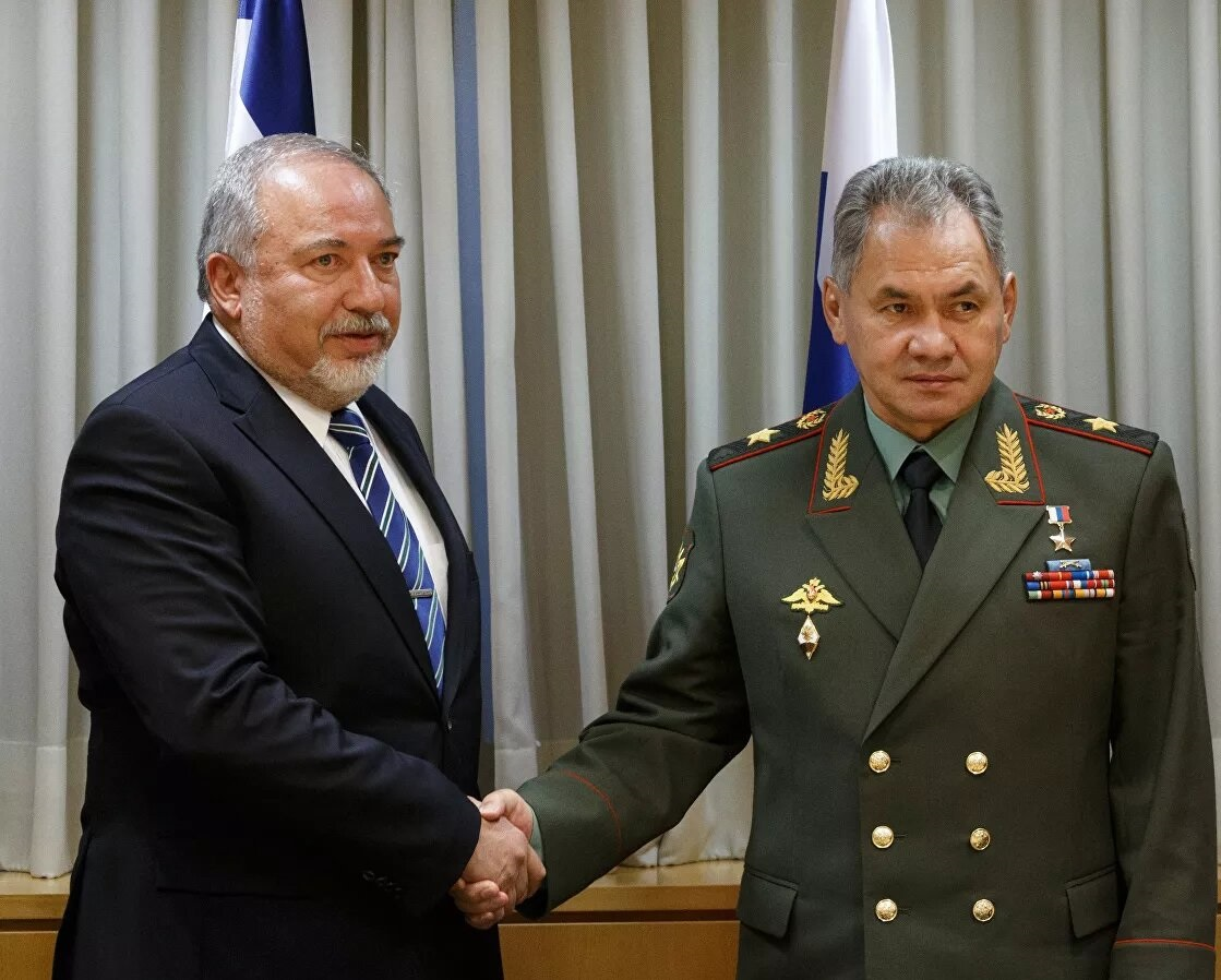 Встреча Министра обороны России генерала армии Сергея Шойгу с главой военного ведомства Израиля Авигдором Либерманом в Тель-Авиве